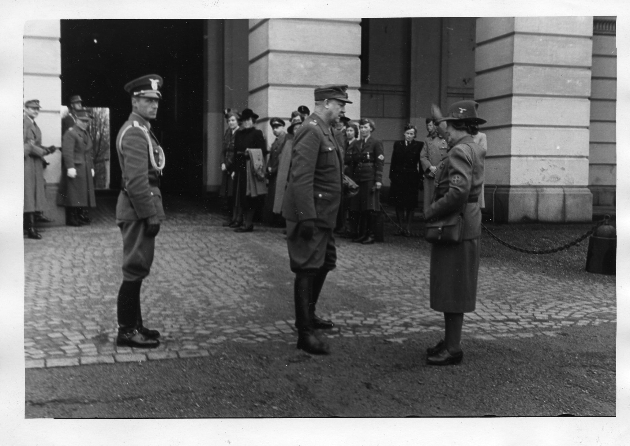 Aftenposten 17. mai 1944: «Ministerpresidenten hylder Kvinnehirden. Talen under appellen på Slottsplassen i går. [...] kledelige grønne uniformer [...]»( Nasjonal samlings kvinneorganisasjons tiårsjubileum) RA/RAFA-3309/U 42/2 /42-2-1 img378